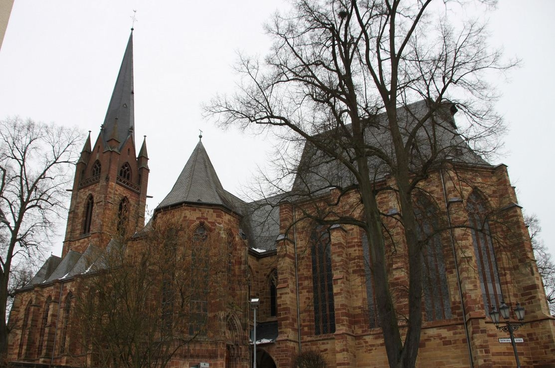 Dies ist die Liebfrauenkirche im hessischen Frankenberg.